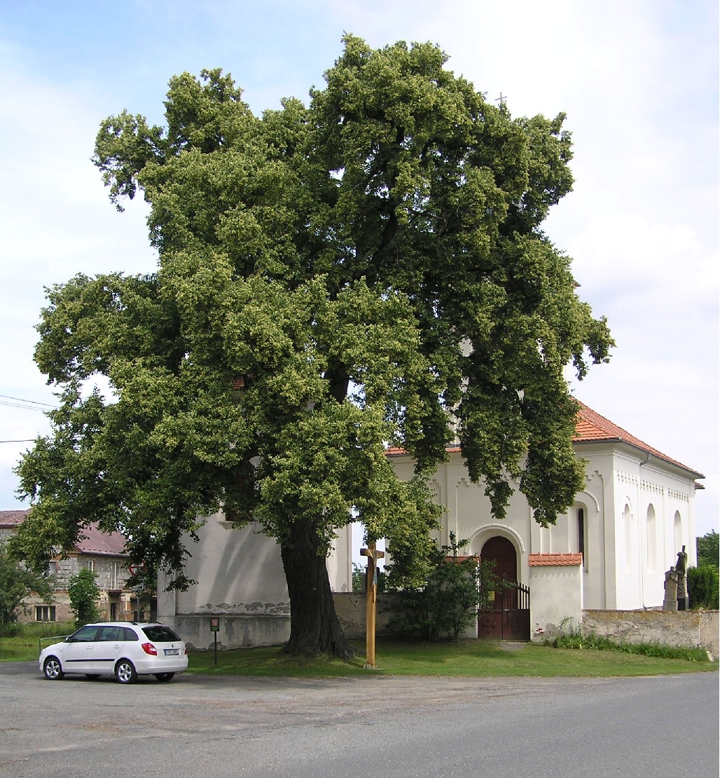 Vidice okres Kutná Hora Chráněná lípa malolistá před kostelem sv. Mikuláše